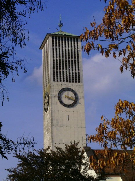 Glockenturm der Kirche Hl. Dreifaltigkeit (Saarlouis)